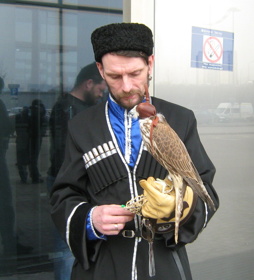 Ловчий сокол на выставке "Охота и рыболовство" в Московской области.